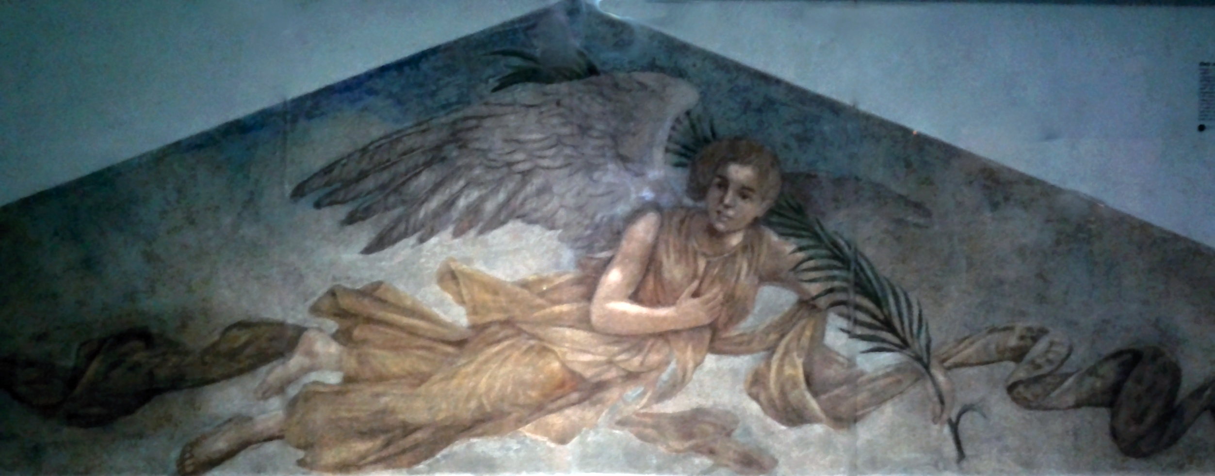 Původní freska na křižovatce U Anděla na Smíchově v Praze